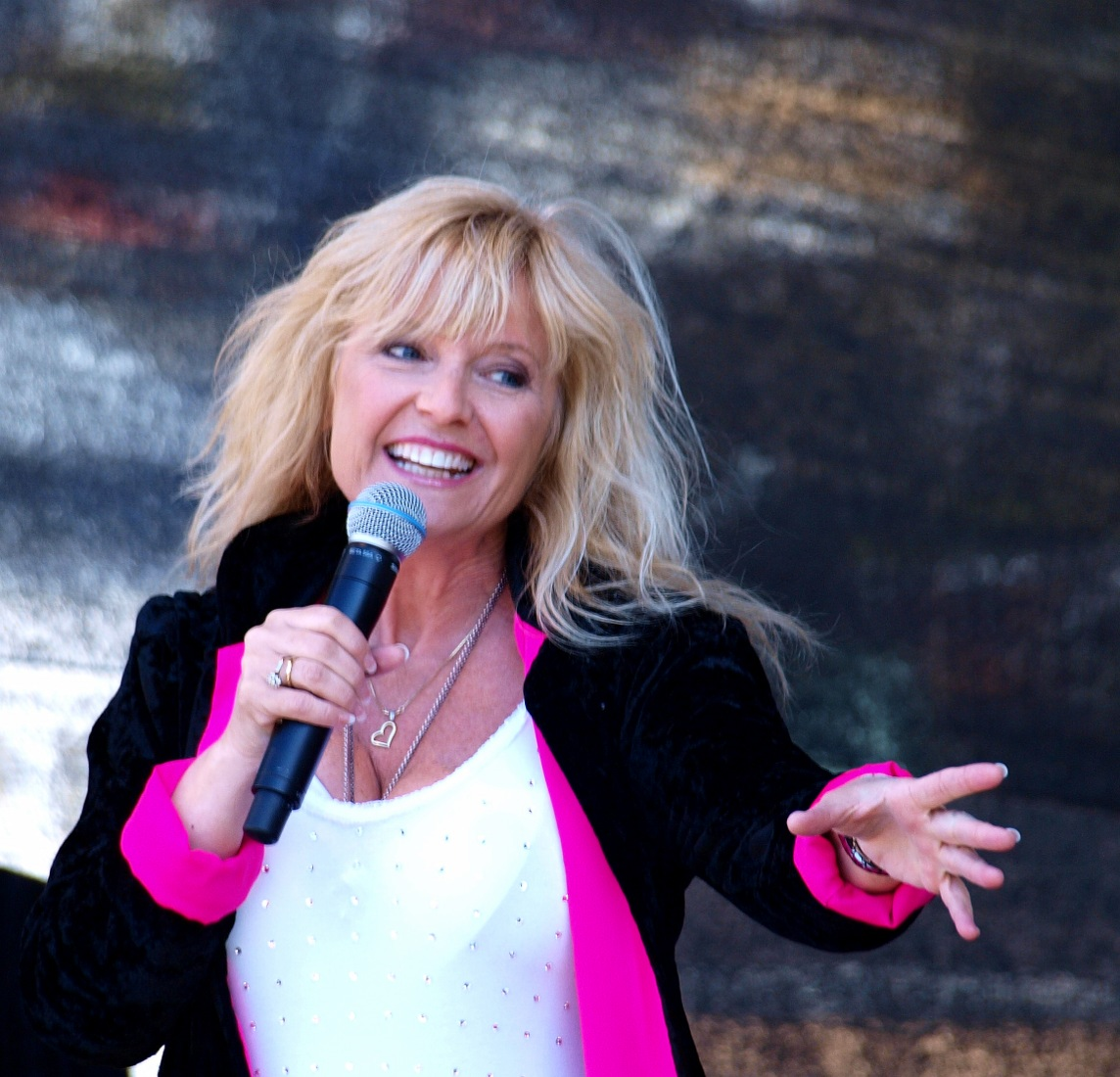 Hanne Krogh at the outdoor scene "Festplassen" in Bergen